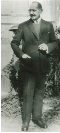 Photo en pieds du Dr Roger Vittoz (1863–1925).